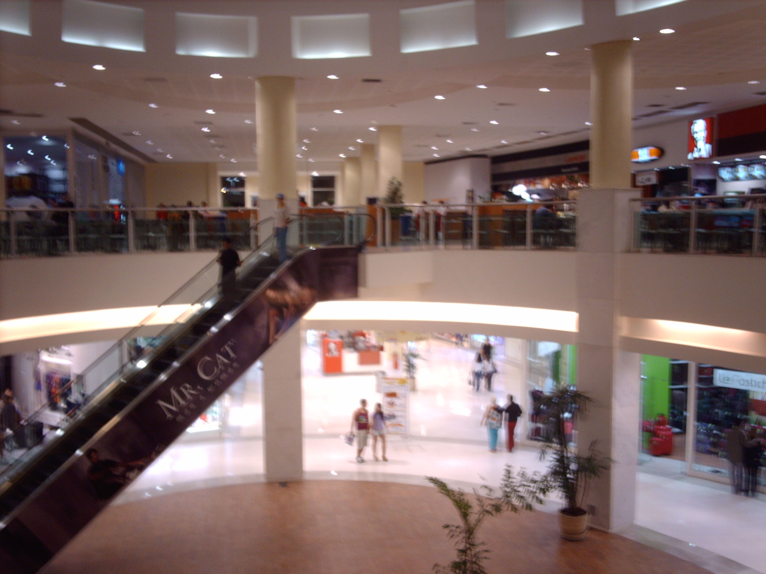 etro